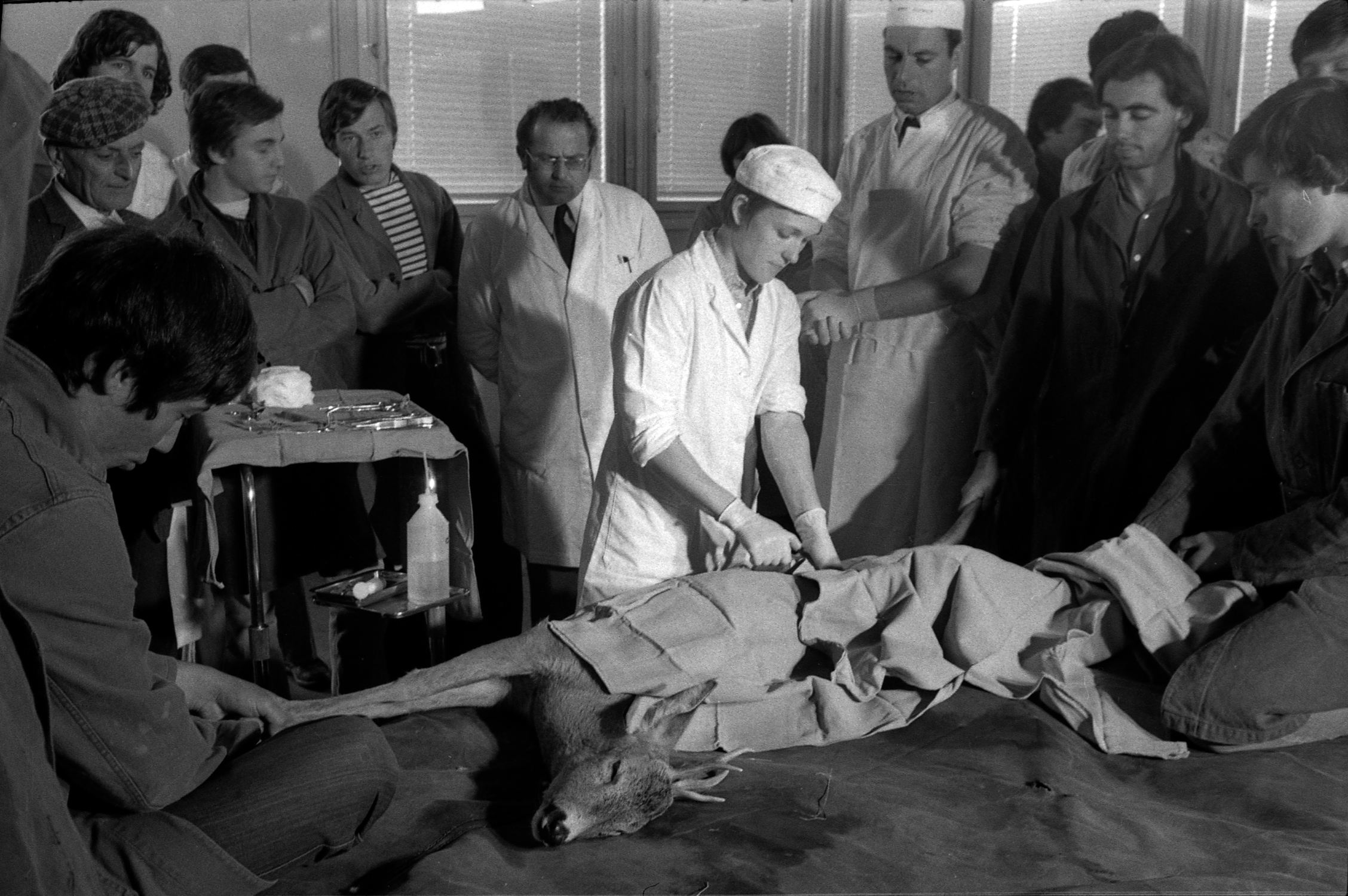 Ecole vétérinaire de Toulouse (chemin des Capelles). 18 mai 1976. Opération d'un brocard (jeune cerf) par des élèves de l'école vétérinaire. Au 1er plan deux élèves (de profil) tiennent un jeune cerf endormi sur table d'opération, drap posé sur lui ; au 2nd plan une élève en blouse blanche (vue de face) est en train de l'opérer ; en arrière-plan d'autres élèves regardent.